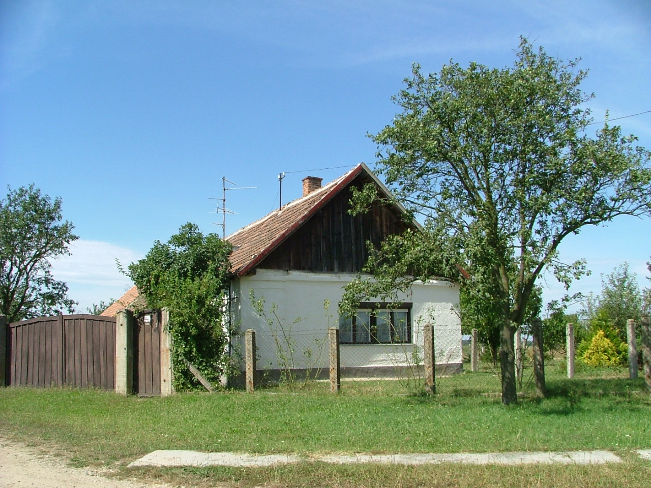 Régi ciráki parasztház